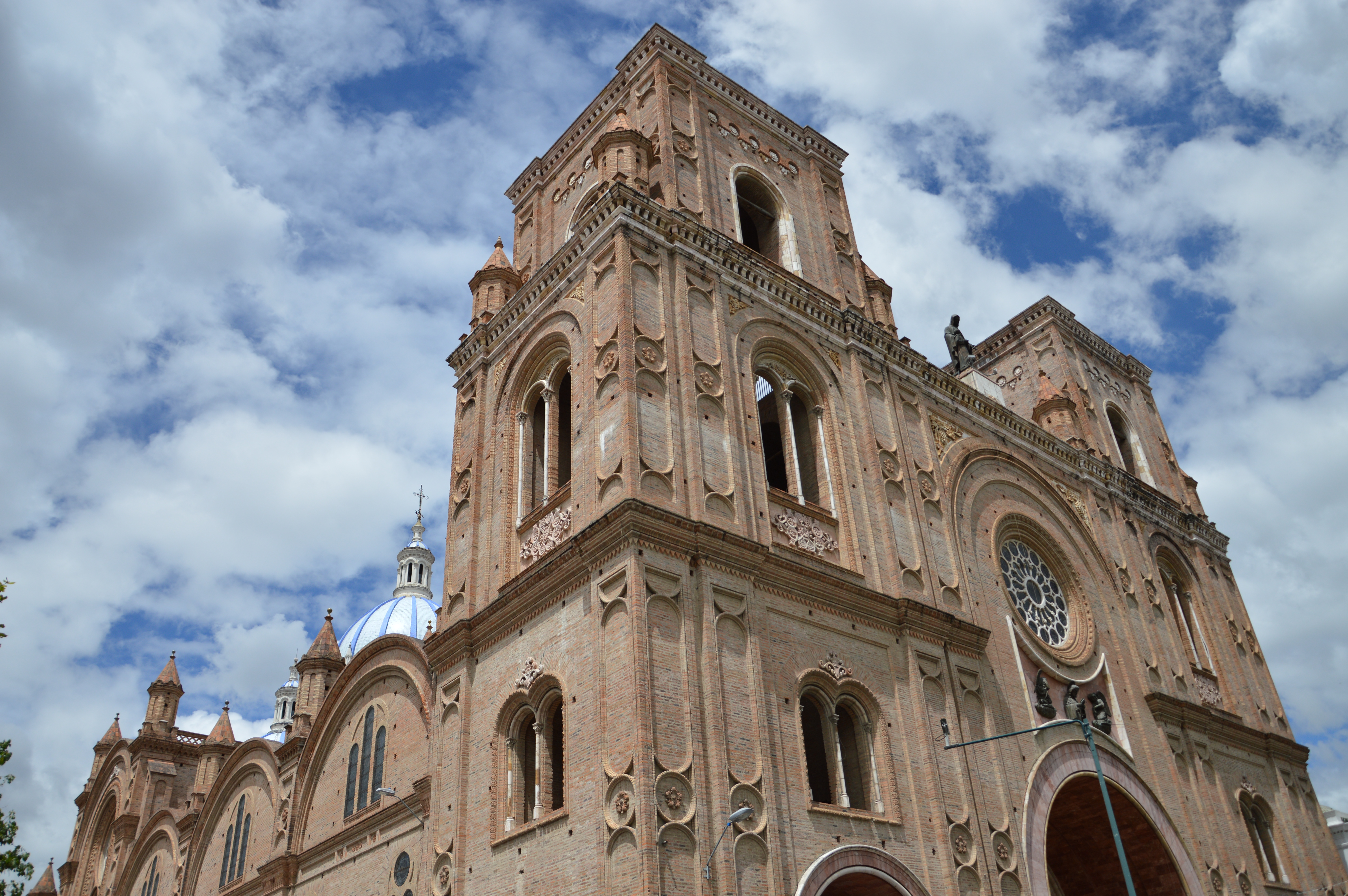 Catedral de Cuenca, Ecuador